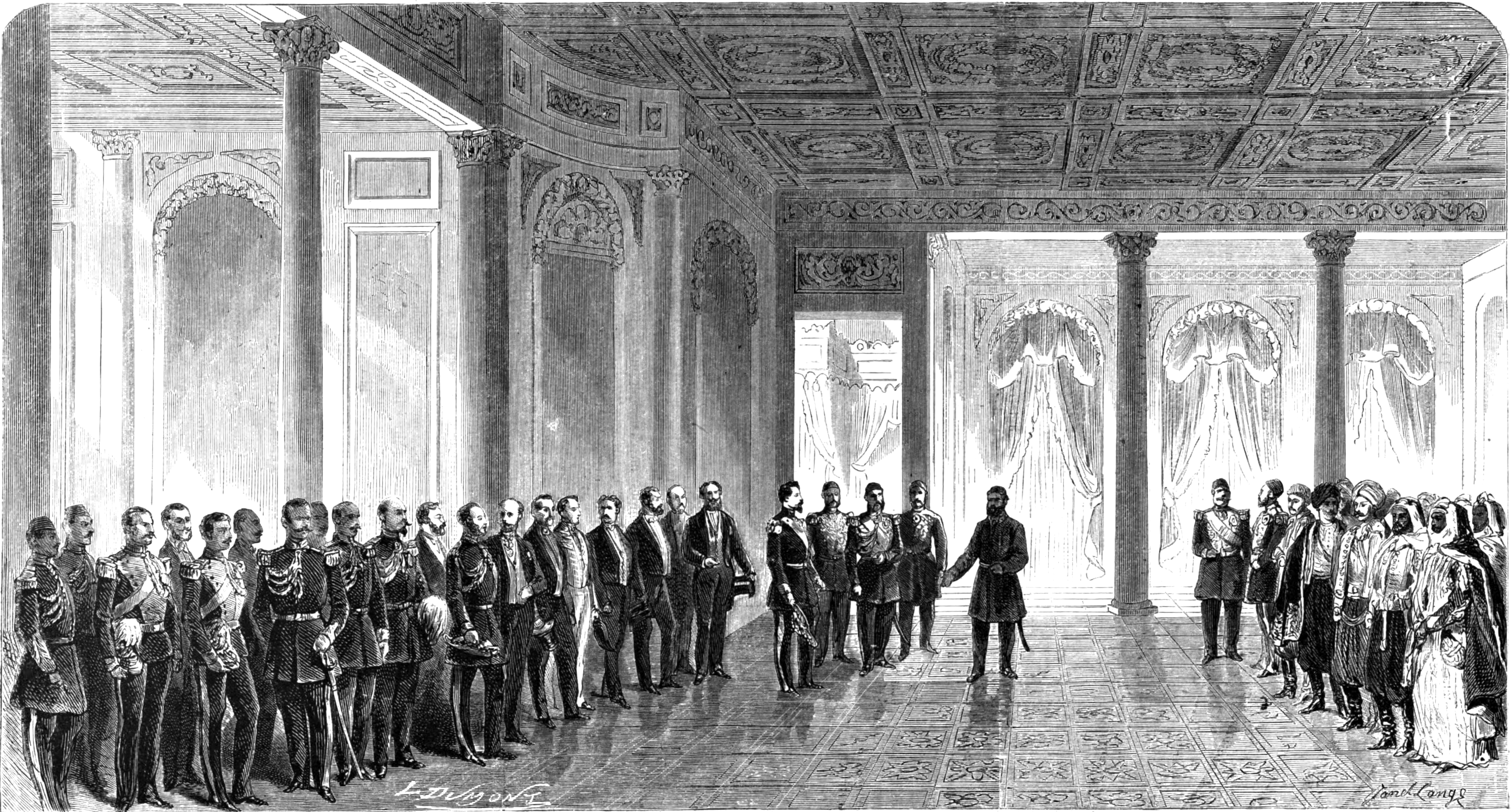 Le Sultan Recevant SAI Le Prince Jean Ier dans son palais de Dolma-Baqtche, Constantinople; D'après un croquis de M. Sathmary